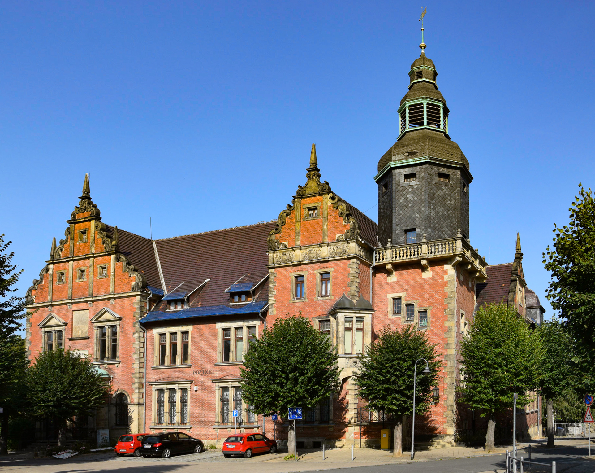 Postamt in Blankenburg (Harz)